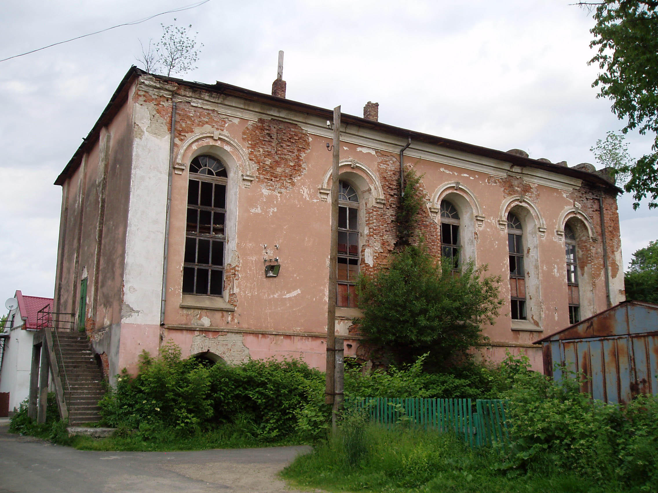 Синагога у Болехові.